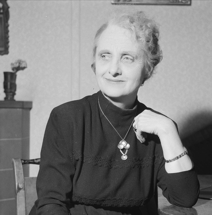 Aagot Børseth var en norsk skuespiller.